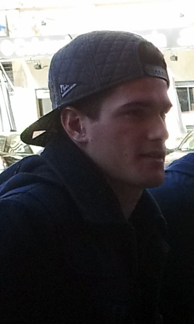 El jugador merengot eixint de Mestalla